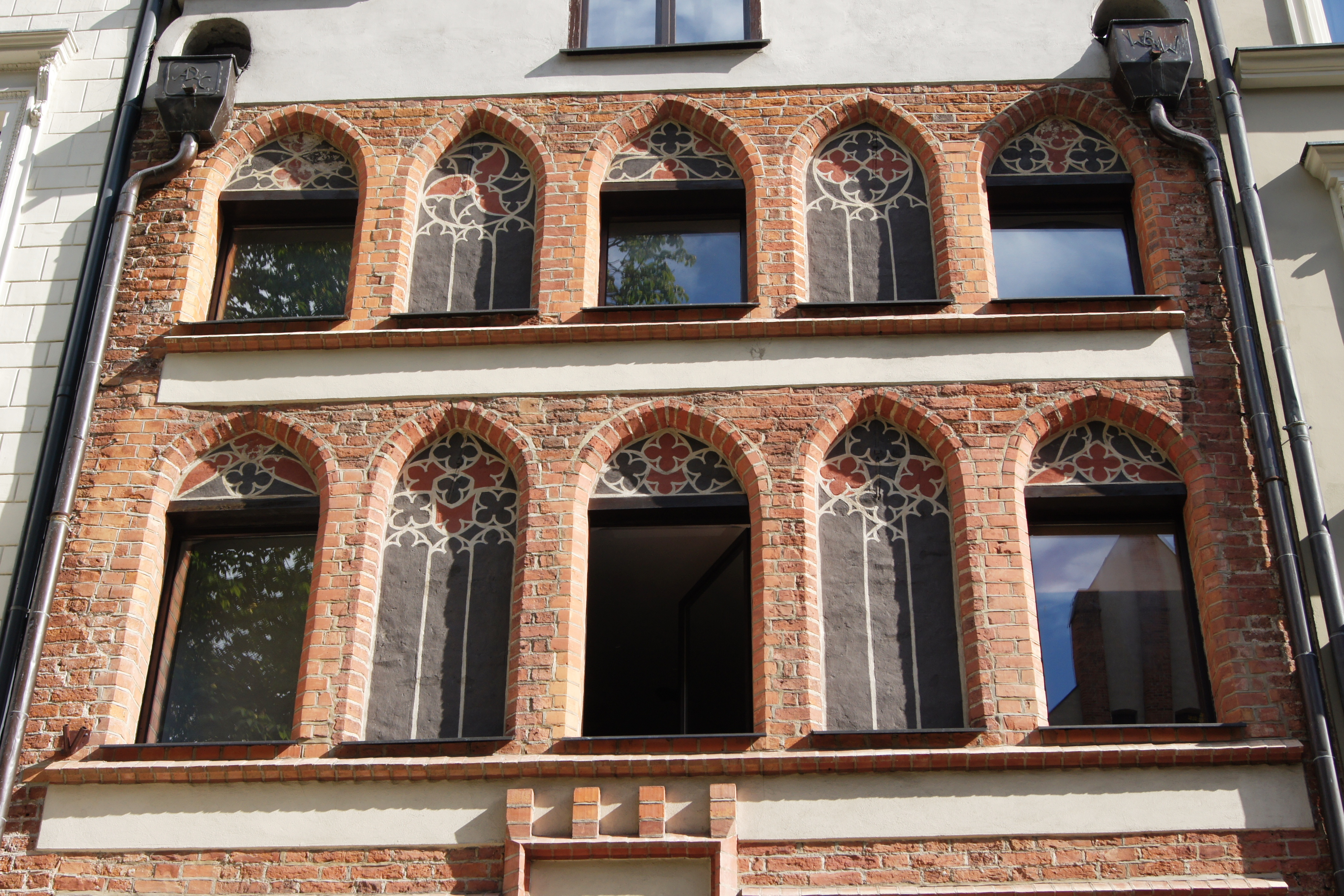 Toruń, ul. Łazienna 22 - kamienica, XIV, 1 poł. XVIII, 1 poł. XIX (zabytek nr rejestr. A/57/300)